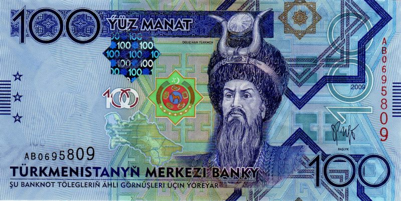 100 manat. Türkmenistan